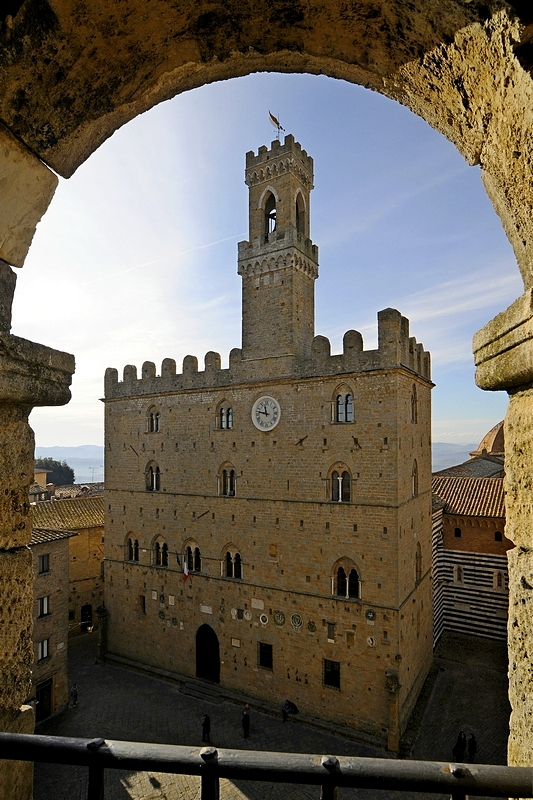 Palazzo dei Priori This is a photo of a monument which is part of cultural heritage of Italy.